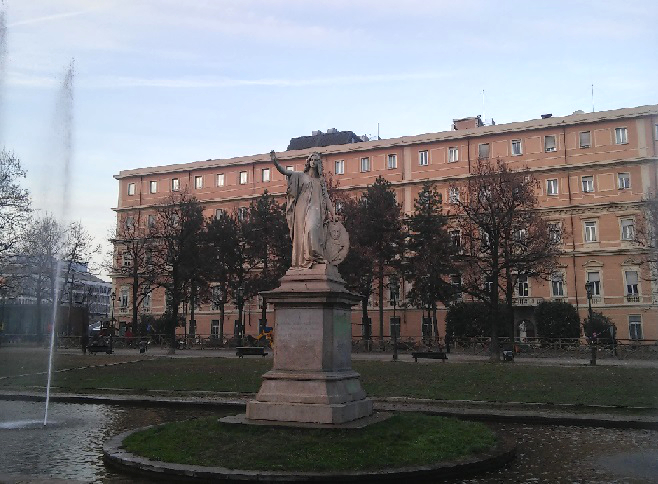 Torino, Aiuola Balbo: monumento all'Italia Incoronata e Daniele Manin